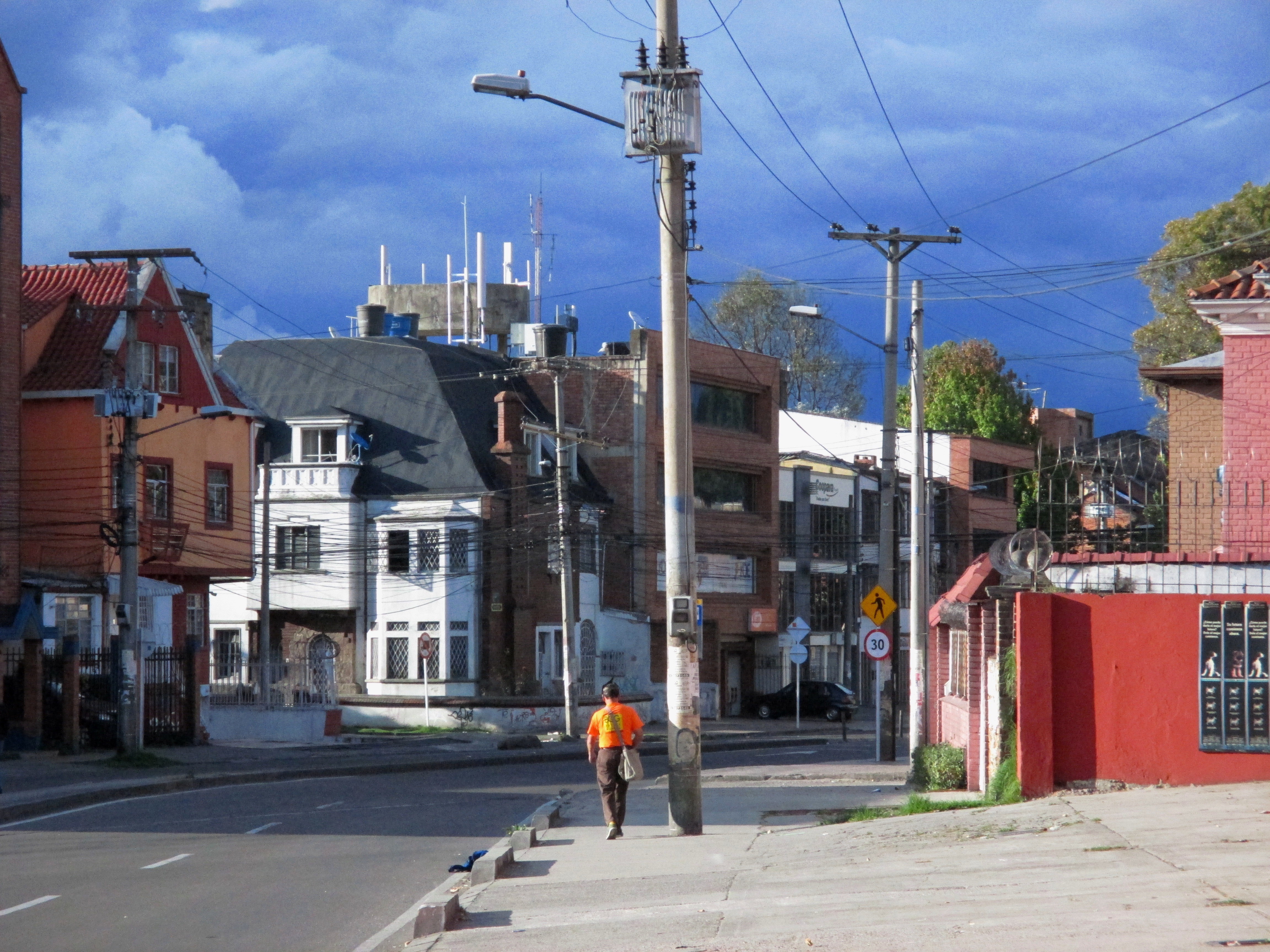 Bogotá, peatón en Teusaquillo carrera 19 calle 39 A